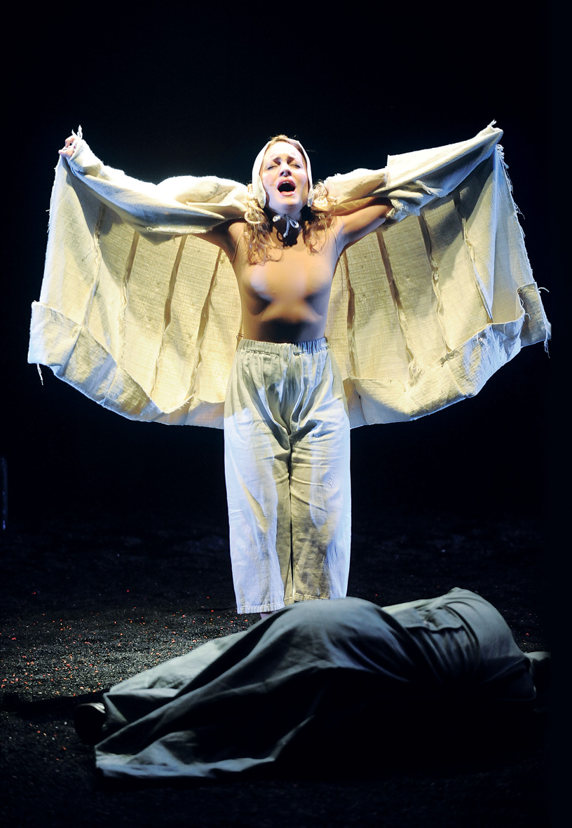 יונה ונער 3